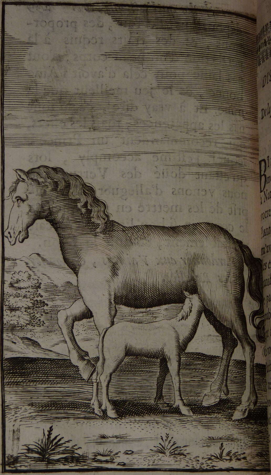 Livre Recueil d'Emblêmes ou tableau des sciences et des vertus morales par I. Baudoin, de l'académie françoise Tome I A Paris chez Jean Cochart, au cinquième pillier de la grande salle du Palais au S. Esprit. M. DC. LXXXV. Avec Privilege du Roy. Livre illustré par Marie Briot